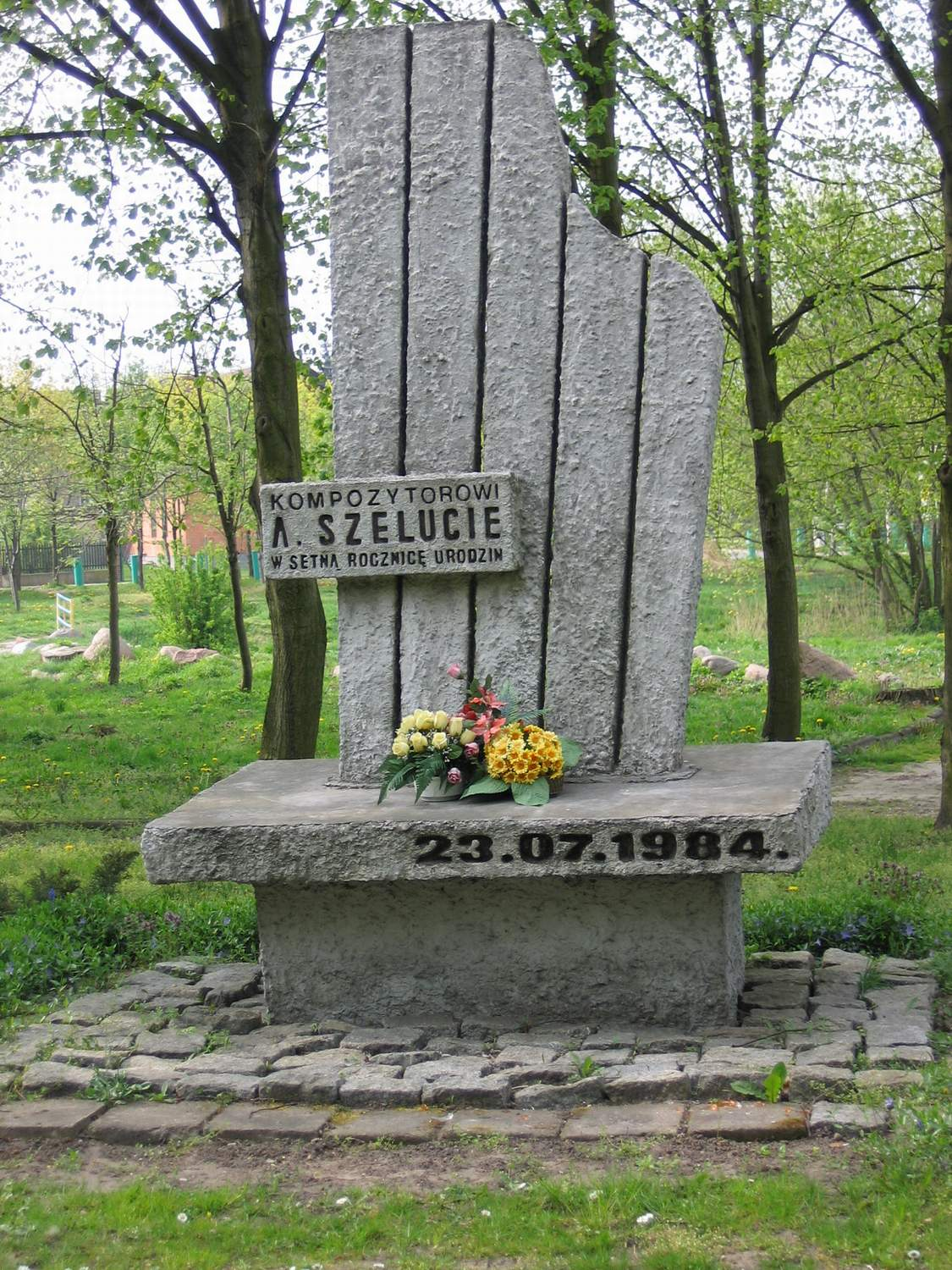 Pomnik ufundowany z okazji 100 lecia urodzin Apolinarego Szeluty, Słupca, Skwer Apolinarego Szeluty. (foto.Marcin Majdecki)